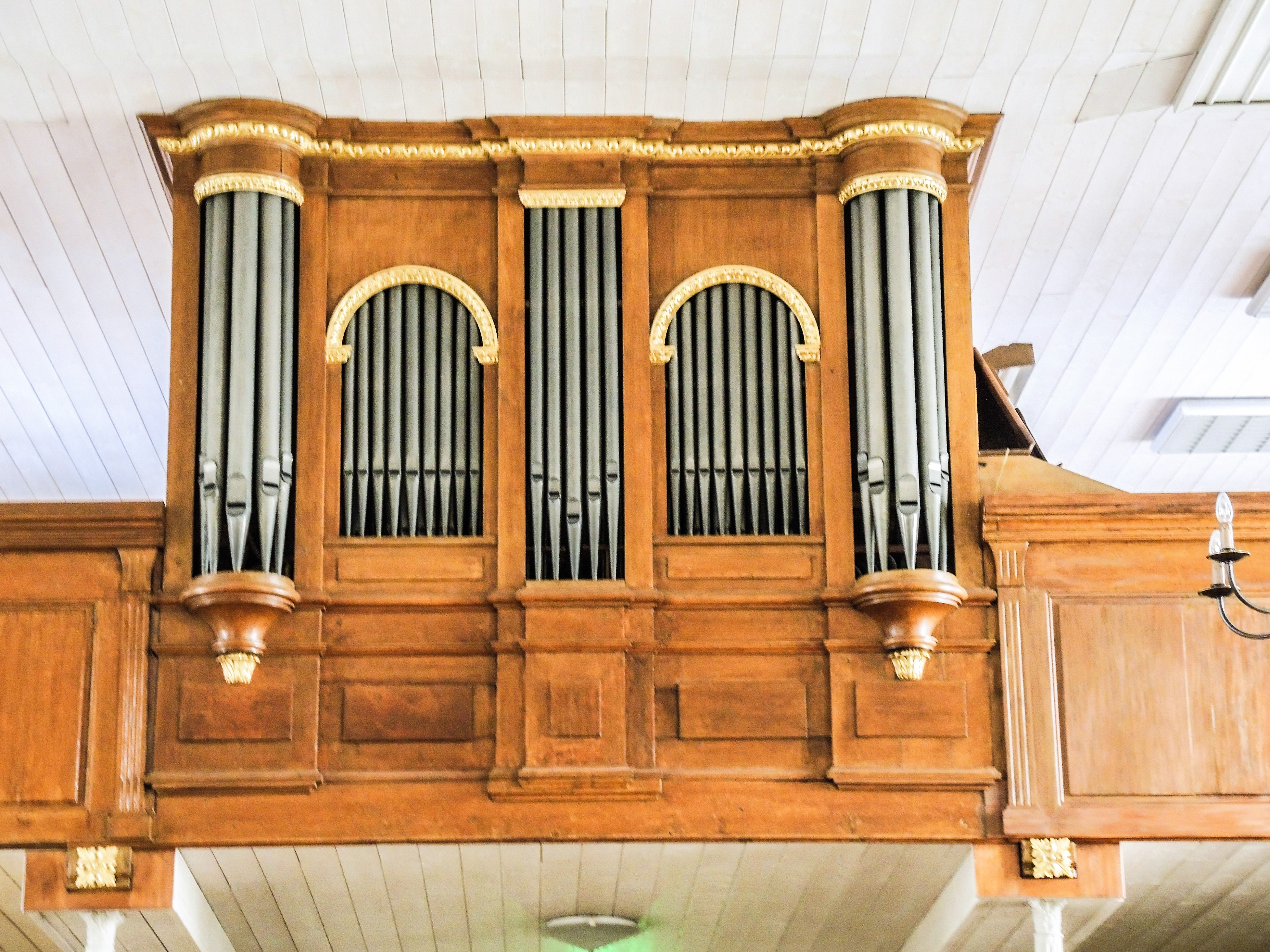 Orgue Rickenbach de 1845, dans l'église d'Oberbruck. Haut-Rhin.